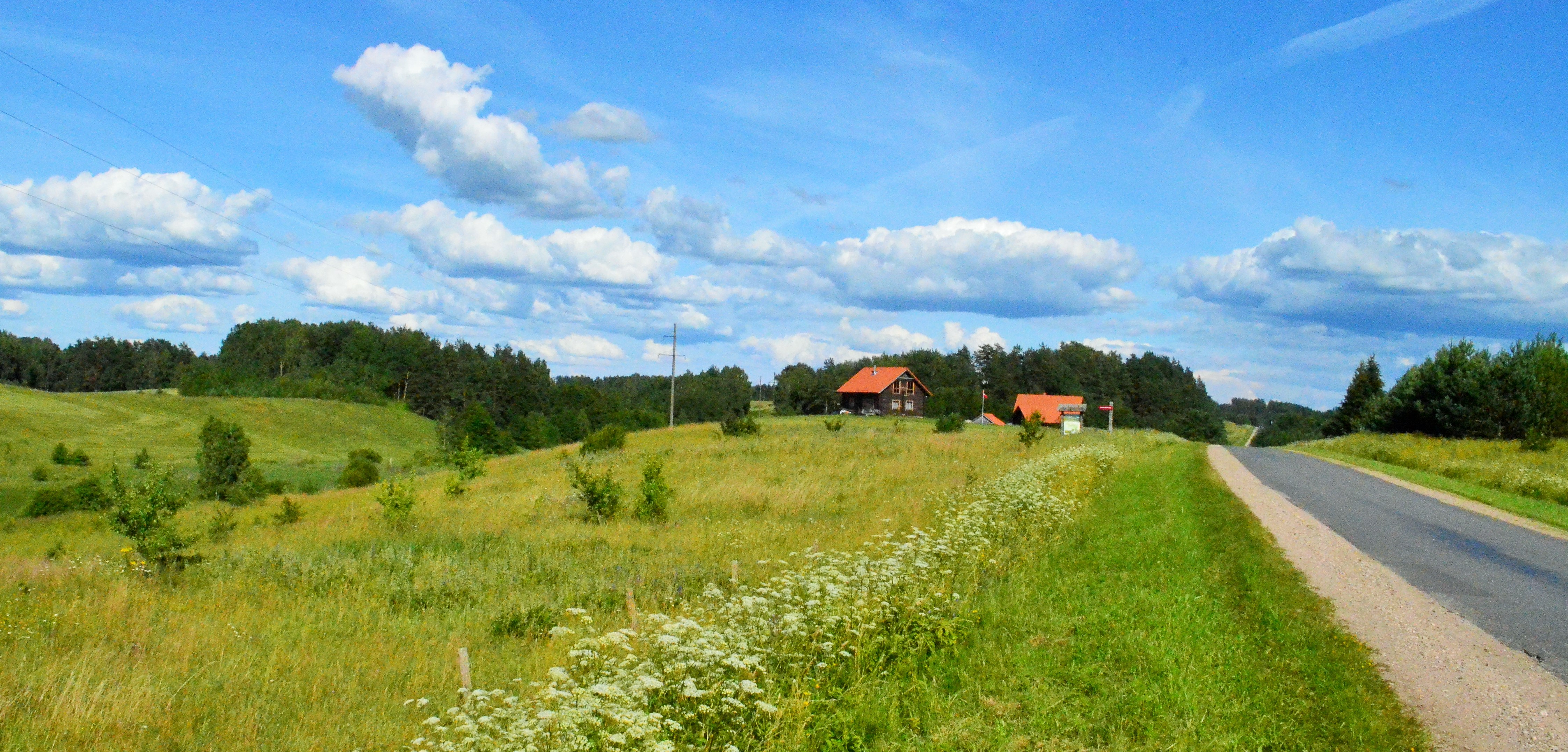 Labotiškiai, Molėtų raj.